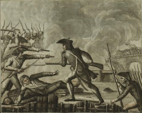 Bataille du pont de Lodi (Italie) le 10 mai 1796, Musée de la Révolution française - Vizille